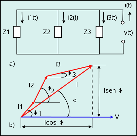 Circuito paralelo (Parallel circuit)